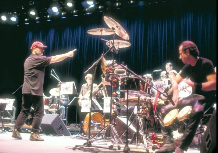 Atilla Engin arşivinden